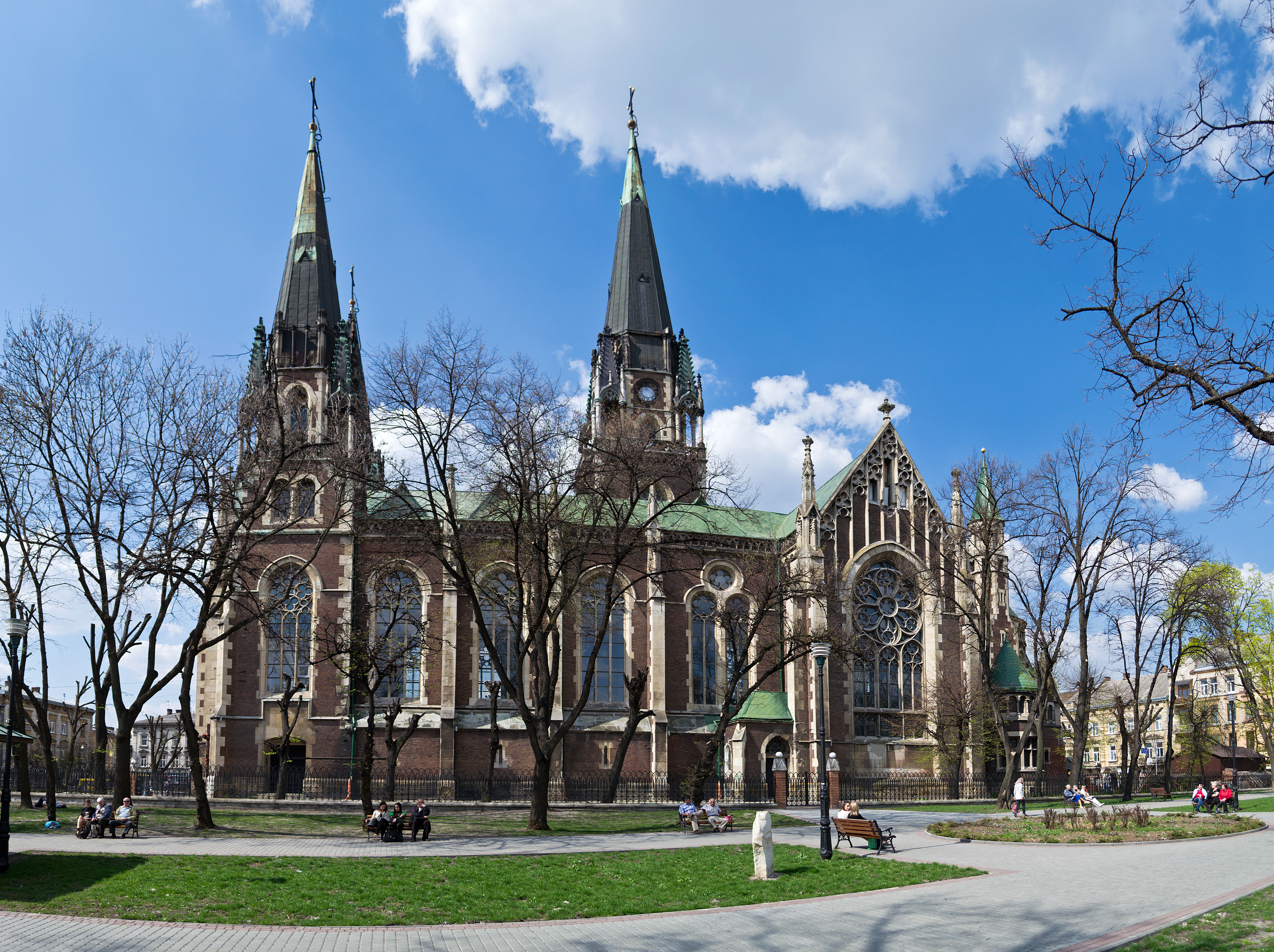 церква св. Ольги і Єлизавети, Львів, Кропивницького пл., 1